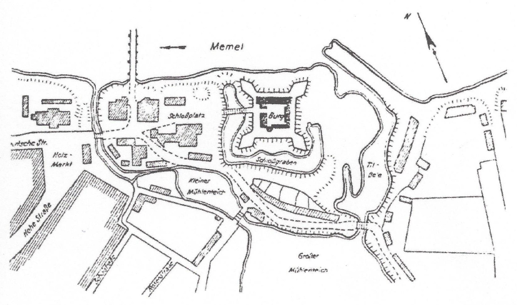 Skizze der alten Anlage Tilsits mit Deutscher Kirche, Schiffbrücke (Memel), Ordensburg und Tilse (l-r)